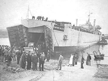 Collectie / Archief : Fotocollectie Anefo Reportage / Serie : [ onbekend ] Beschrijving : Landingsboten als pont tussen Engeland en Nederland Annotatie : [negatief ontbreekt]Naam schip: Empire Baltic Datum : 6 september 1946 Fotograaf : Hof, […] van 't / Anefo Auteursrechthebbende : Nationaal Archief Materiaalsoort : Glasnegatief Nummer archiefinventaris : bekijk toegang 2.24.01.09 Bestanddeelnummer : 901-9130